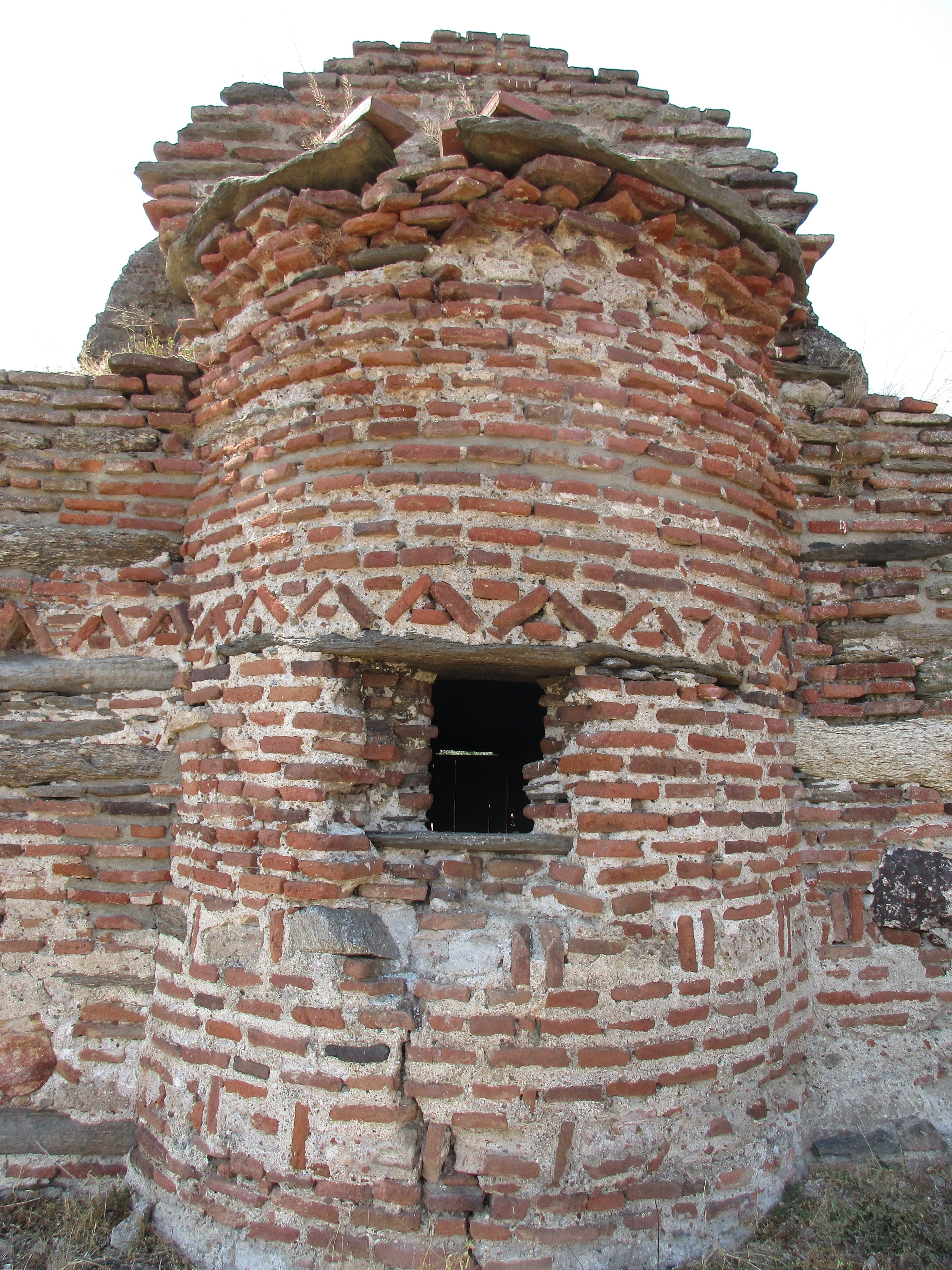 Srpski (latinica): Glašince